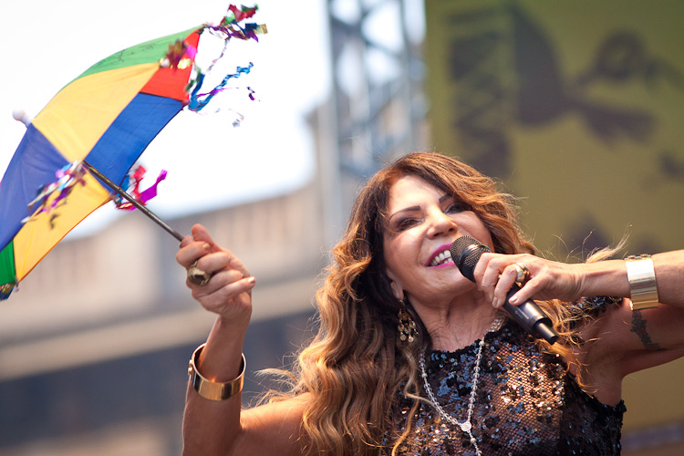 Elba Ramalho canta em homenagem a Luiz Gonzaga em palco montado no Vale do Anhangabau, SÃO PAULO, SP, BRASIL.